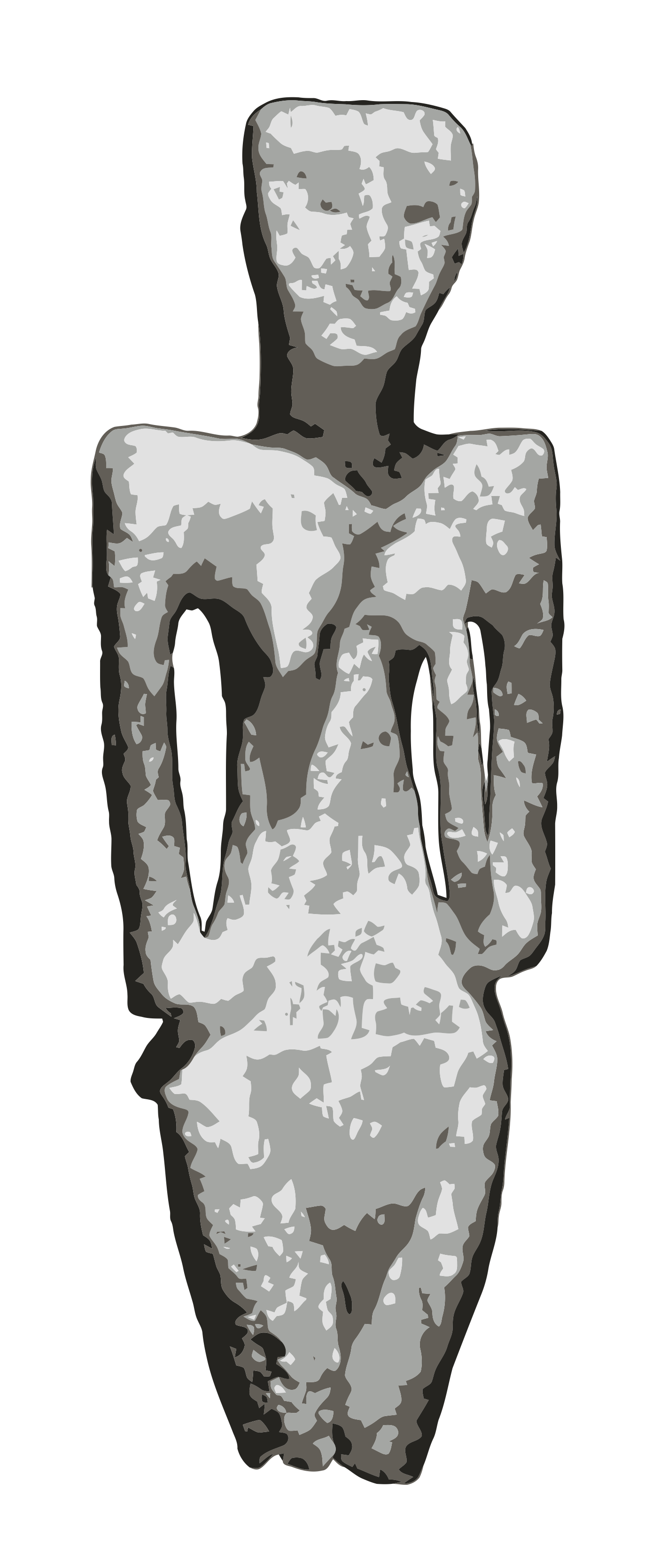 Ídolo en alabastro representando a una mujer o divinidad femenina, con las manos en ambos pechos (símbolo nutricio, fértil, de abundancia). Fue localizado en una de las fosas fundacionales del poblado.